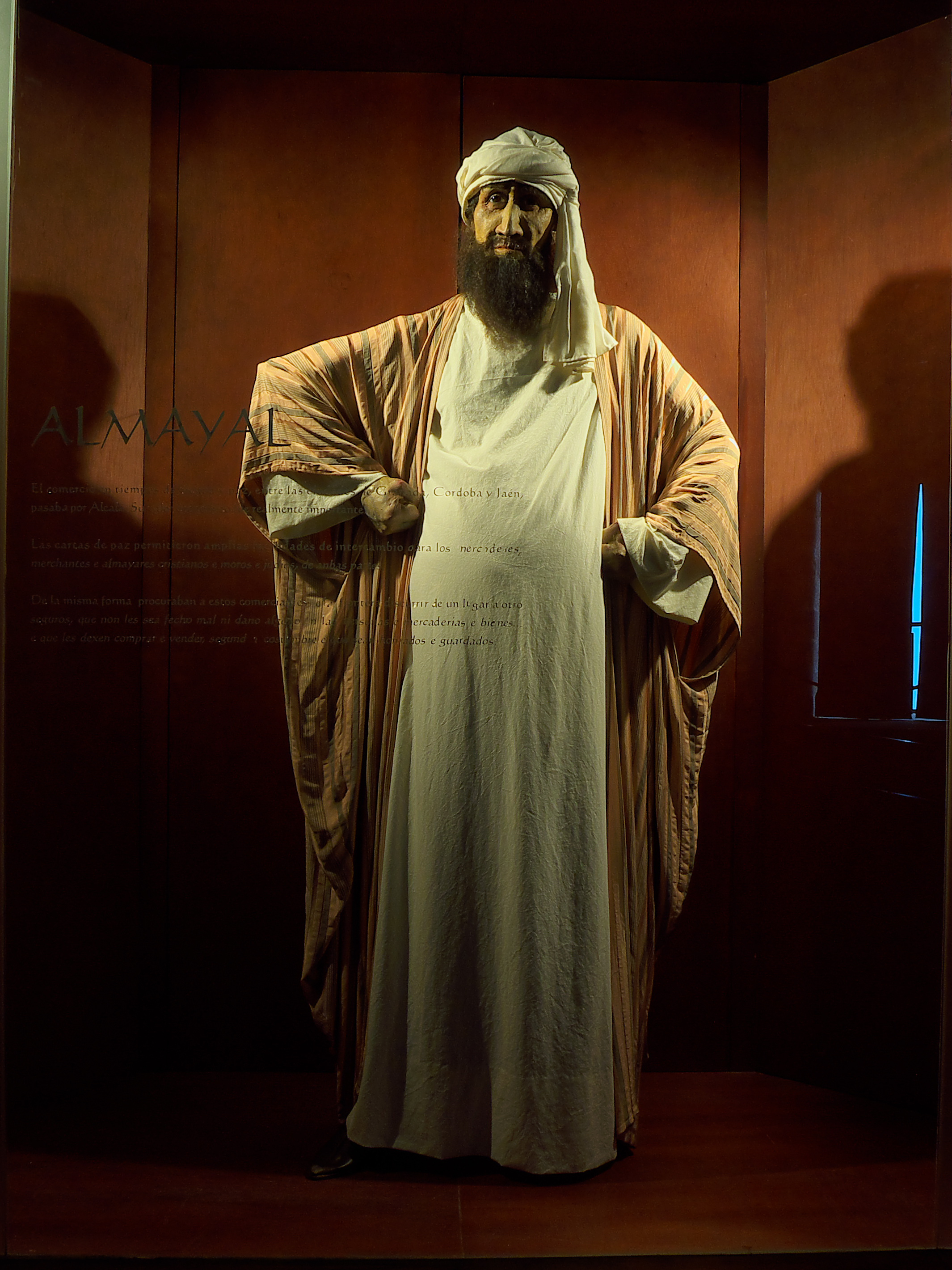 Fortaleza de la Mota, o Castillo de Alcalá la Real (Jaén). Los almayares, comerciantes autorizados a comerciar en las distintas fronteras, gozaban de protección.